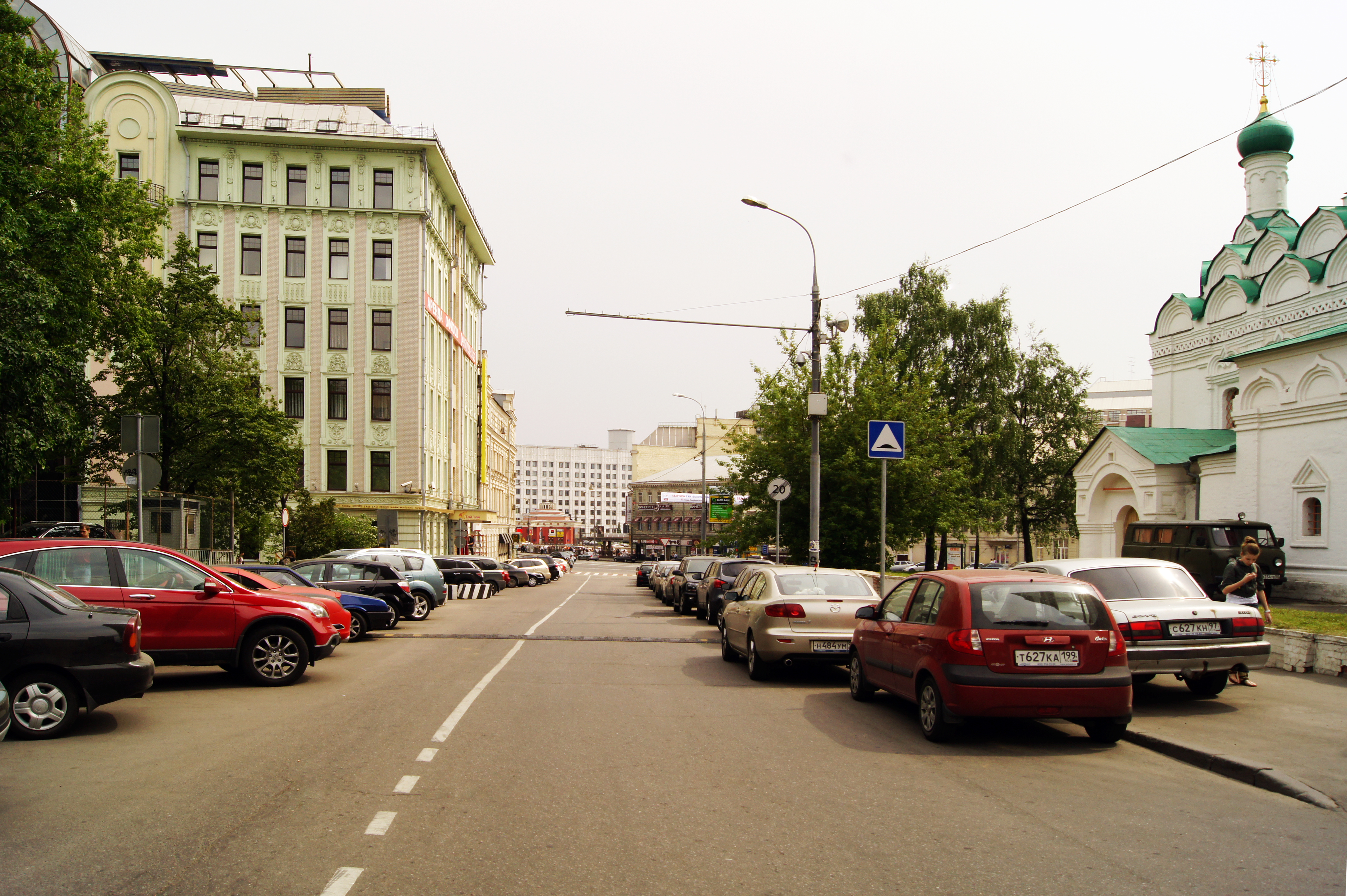 Поварская улица в Москве